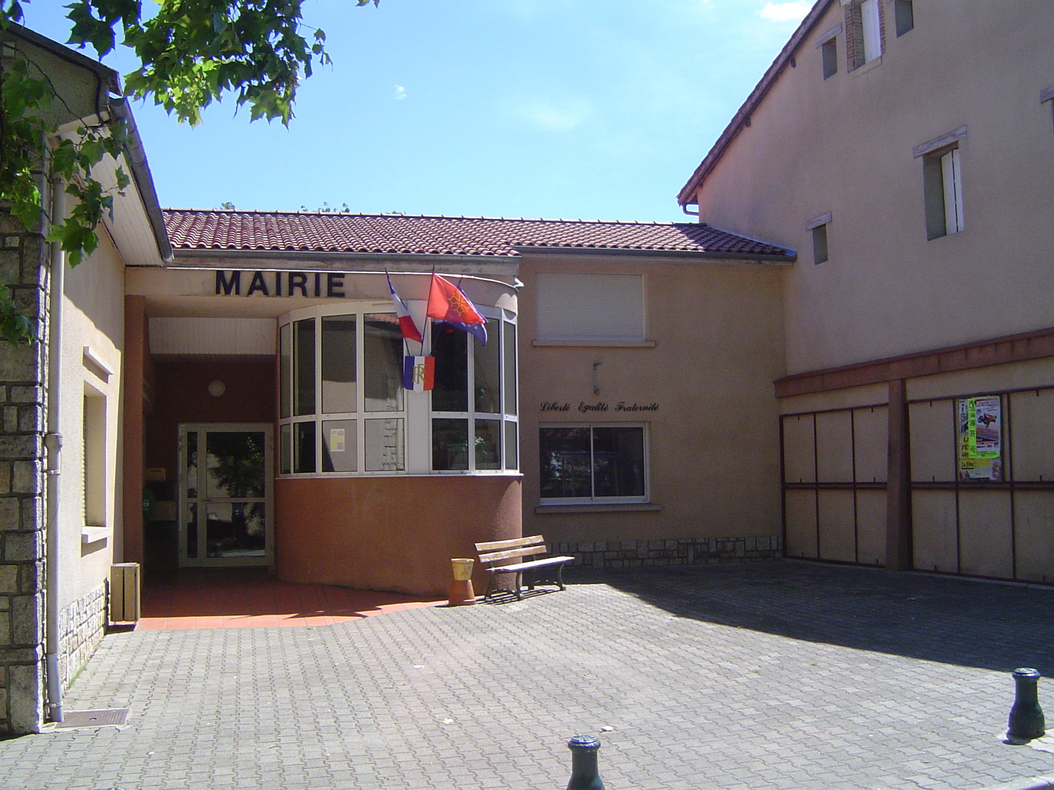 Mairie de la commune d'Aureville.